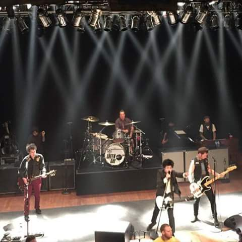 Green Day tocando en el house of blues